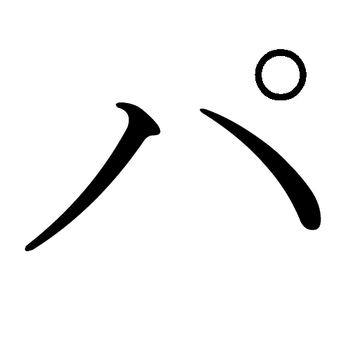 Japanese Katakana "Pa"